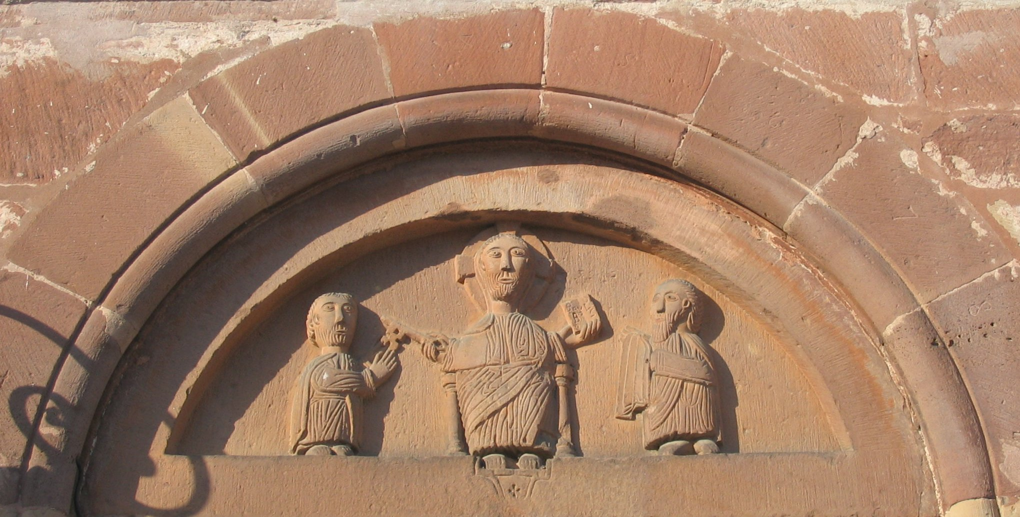 tympan roman du XIIe siècle sur l'église Sainte-Richarde à Marlenheim (Bas-Rhin). Le Christ est représenté avec les apôtres Pierre et Paul.